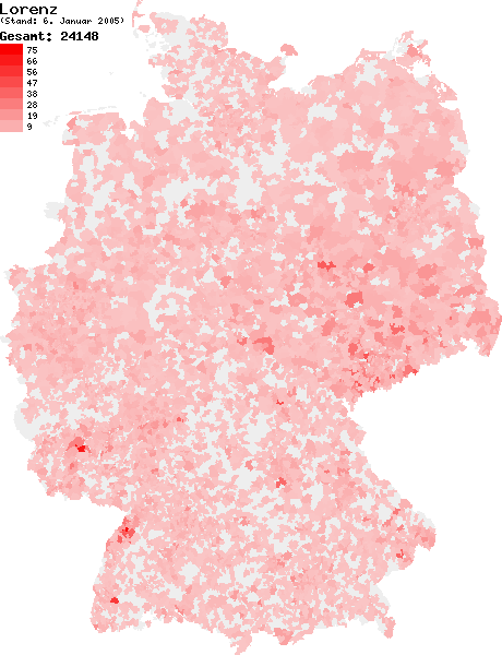 Verteilung des Nachnamens Lorenz in Deutschland nach dem Telefonbuch mit Stand vom 6. Januar 2005